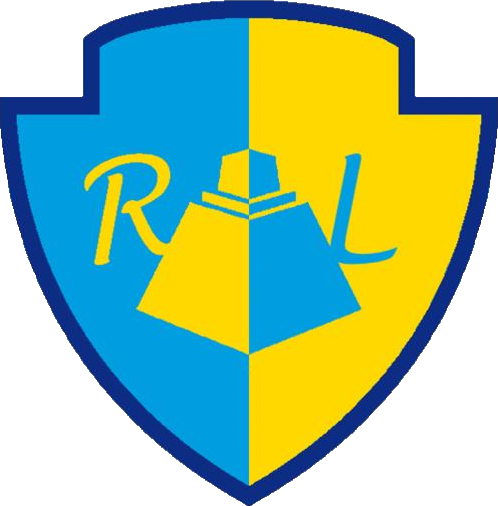 Primer escudo del club